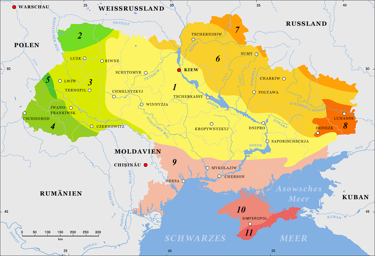 Tektonische Struktur der Ukraine 1. Ukrainischer Schild 2. Koweler Moränenrücken 3. Wolhynisch-Podolische Platte 4. Karpaten Falten- und Überschiebungsgürtel 5. „Westeuropäische Tafel“ (Ukrainischer Teil) 6. Dneprtiefland 7. Woronesch-Anteklise 8. Donezplatte 9. Schwarzmeersenke 10. Sarmatischer Kraton oder Skythische Platte 11. Krimgebirge, ein Teil des Kimmerischer Faltengürtels